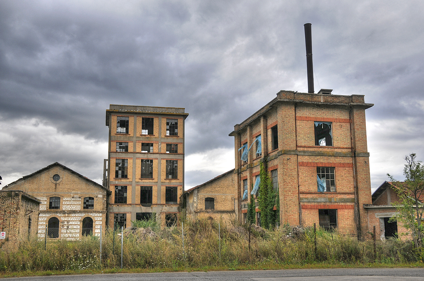 ex zuccherificio di Avezzano